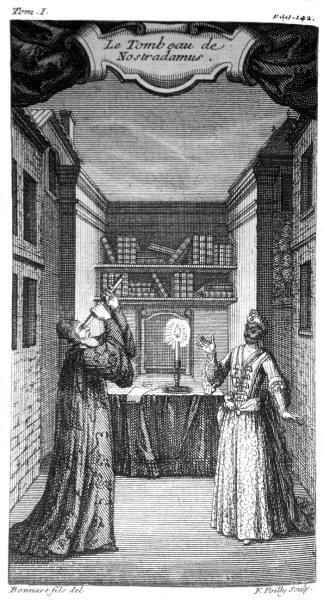 Title image from 1721 Le Tombeau de Nostradamus